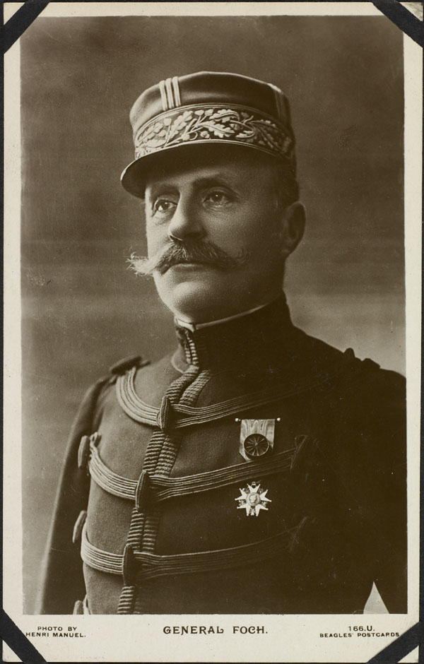 Title / Titre : Marshal Foch - The Generalissimo! / Maréchal Foch - le Généralissime! Creator(s) / Créateur(s) : Henri Manuel Date(s) : Unknown / Inconnue Reference No. / Numéro de référence : e007150915, MIKAN 1965681 Location / Lieu : Unknown / Inconnu Credit / Mention de source : Henri Manuel. Library and Archives Canada / Henri Manuel. Bibliothèque et Archives Canada Description / Descriptions : General Ferdinand Foch. / Général Ferdinand Foch.